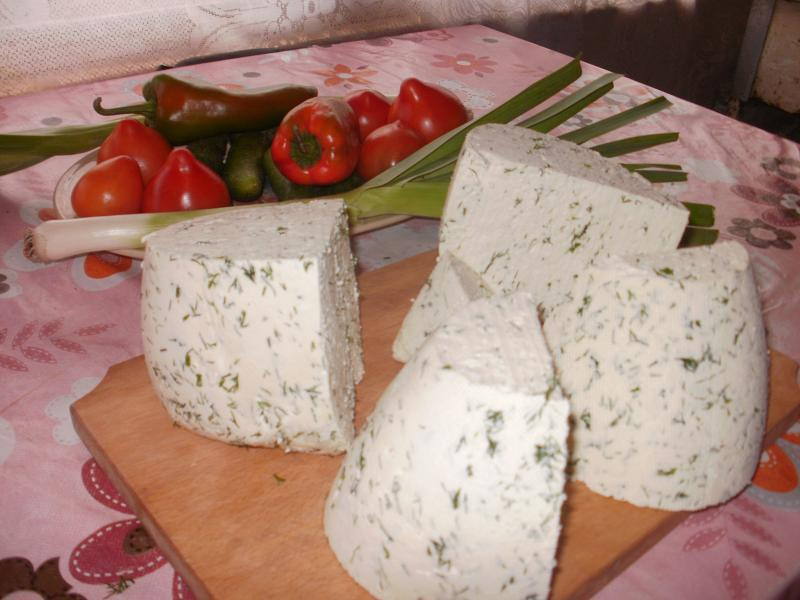 Brânză din lapte de vacă şi capră, amestecată cu mărar verde